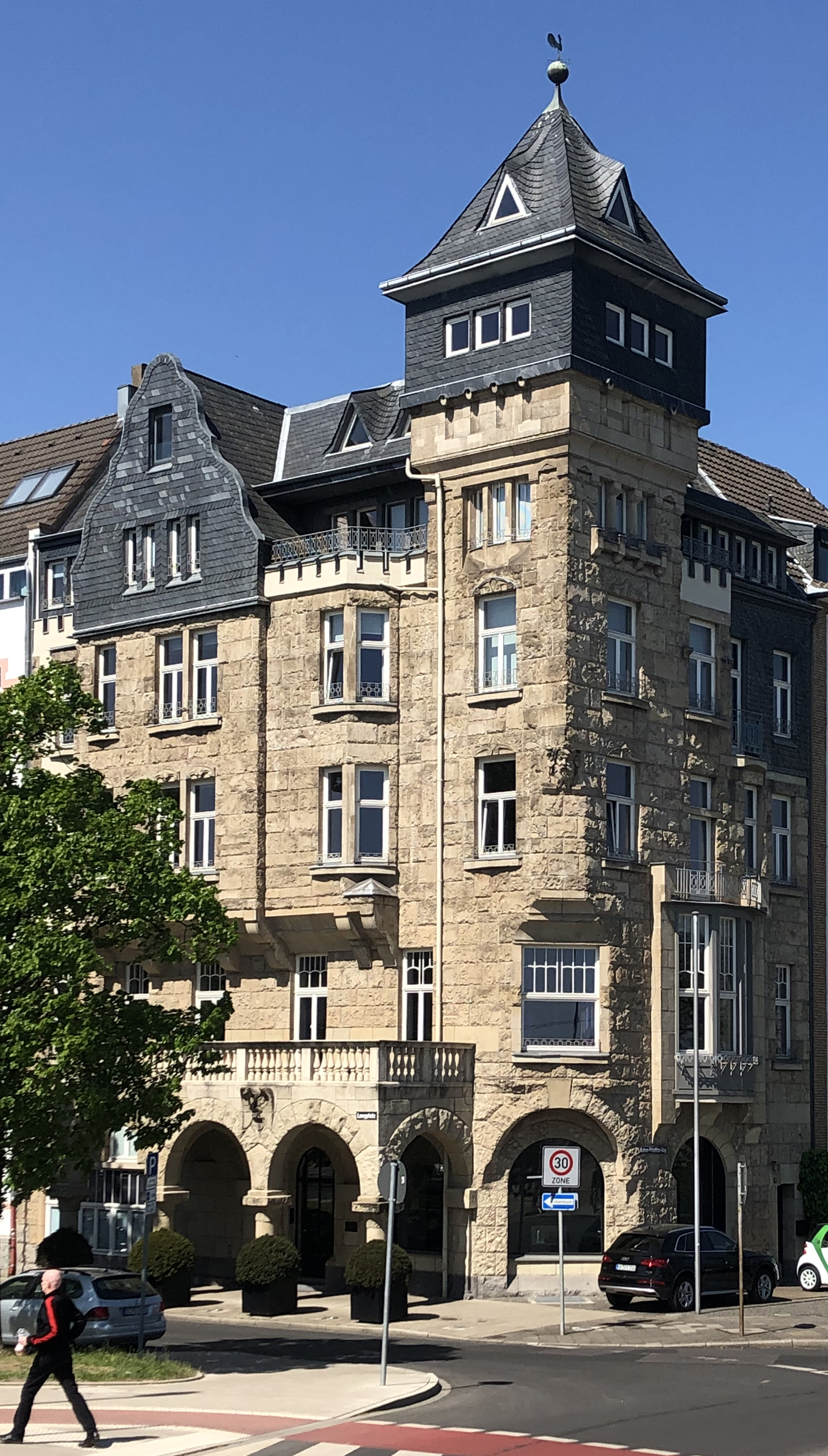 Brückenschlösschen, Kaiser-Friedrich-Ring 1 Ecke Luegplatz, Düsseldorf-Oberkassel